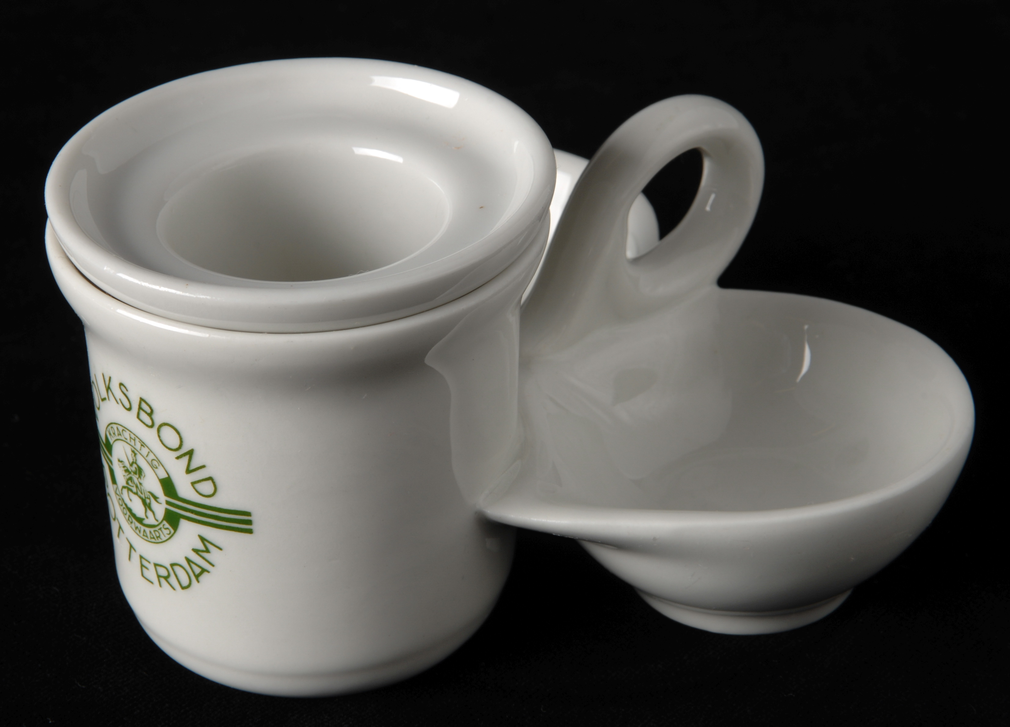 Wit peper-, zout- en mosterd-stel met groen logo Volksbond Rotterdam, geheel uit één stuk: twee bijna ronde bakjes en hoog cilindrisch potje waarin los kleiner potje. Rond oor tussen beide bakjes. Wit. Op mosterdpot in groen: cirkel waarin ridder te paard en opschrift "Krachtig voorwaarts - Volksbond Rotterdam". Gestempeld onderzijde mosterdpot: sfinx waaronder "P. Regout & Cie, Maastricht. Porcelein, made in Holland". Afmetingen: 12,5 x 7,1 cm. Collectie: Museum Rotterdam, ref.nr. 64106-A-B.